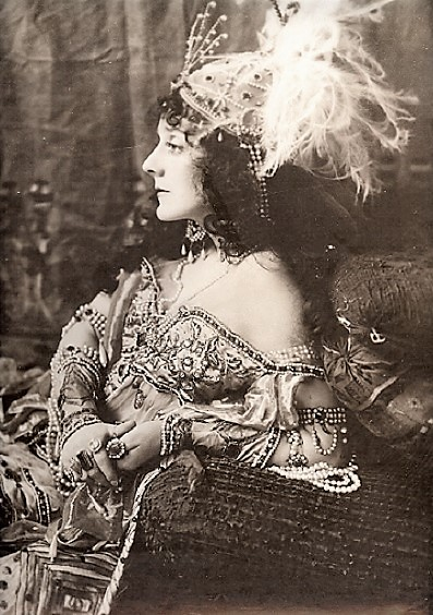 Gertrude Hoffman